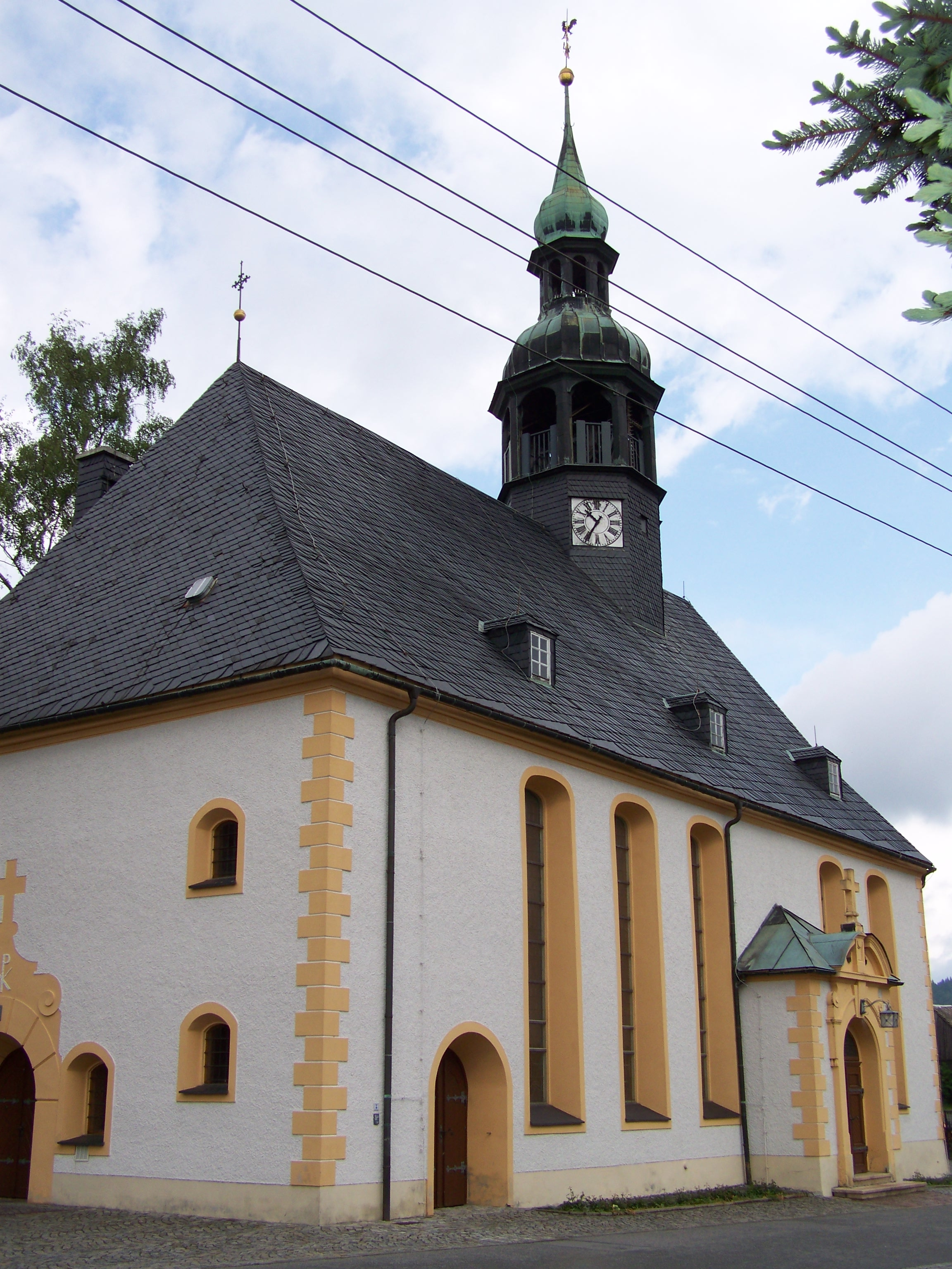 Die Kirche in Neudorf (Sehmatal), Ansicht